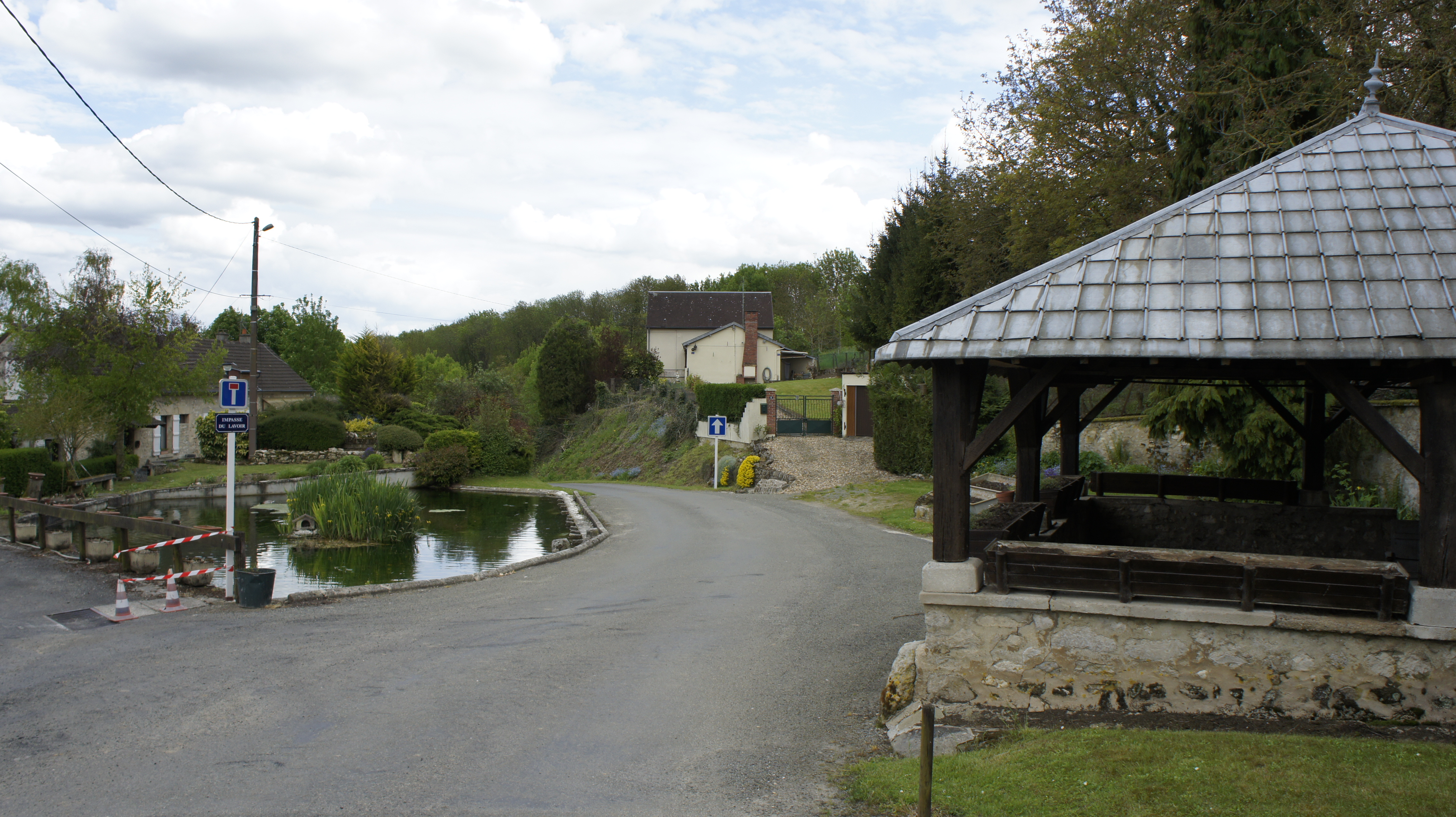 Place à l'entrée du village .